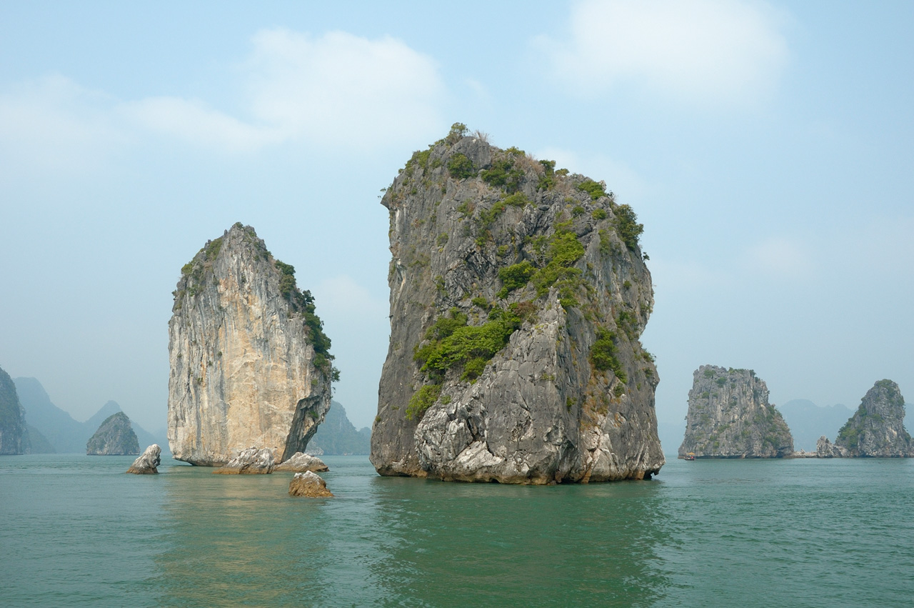 Huge karst rocks in Ha-Long Bay, Vietnam.